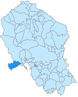 Mapa de Palma del Río en la provincia de Córdoba, Andalucía, España.